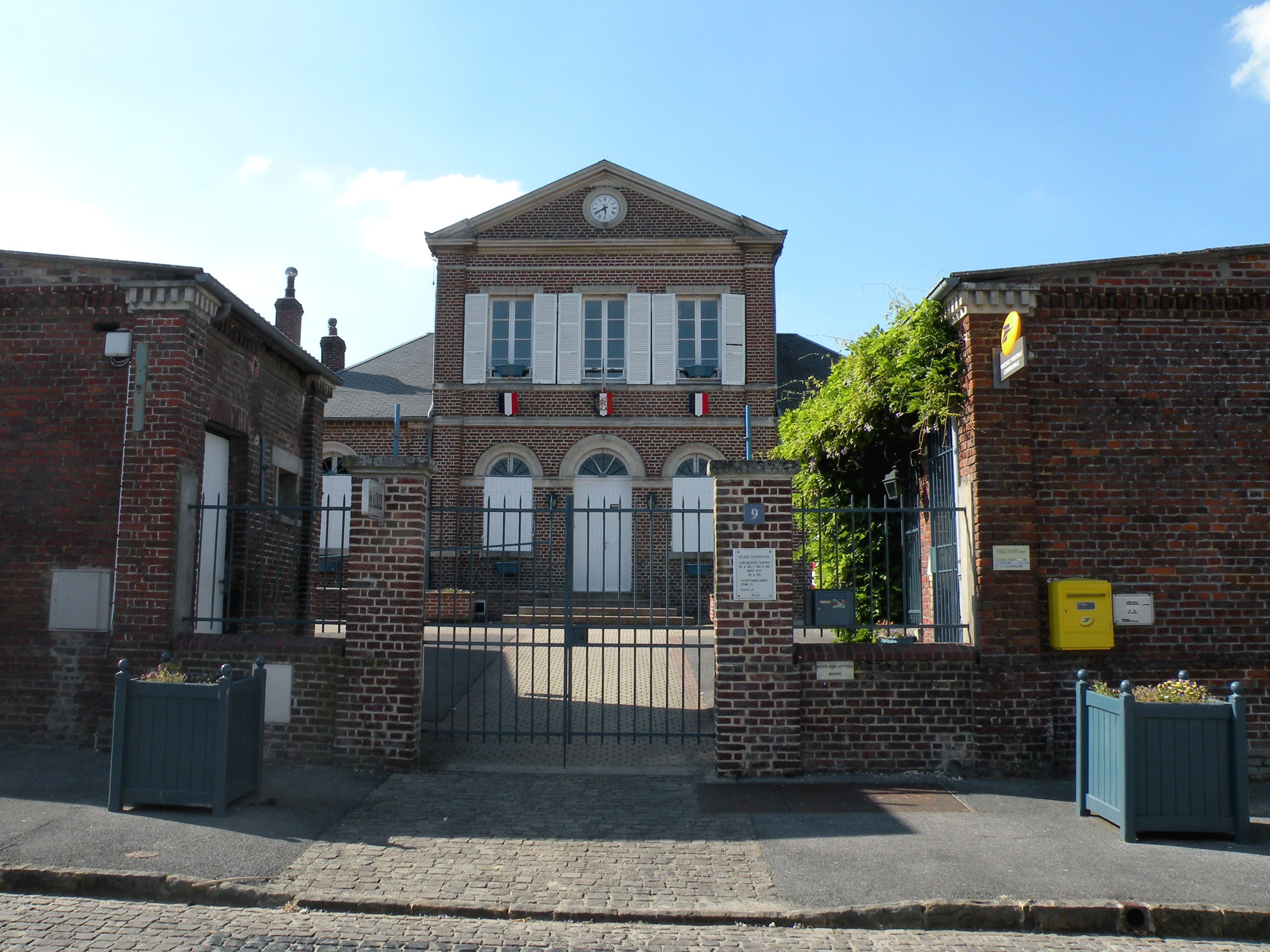 mairie à Allonne, Oise, France